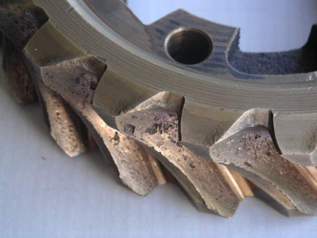 Roue creuse pour pont arrière à vis